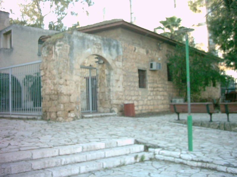 מוזיאון הח'אן בחדרה: צילמתי היום.